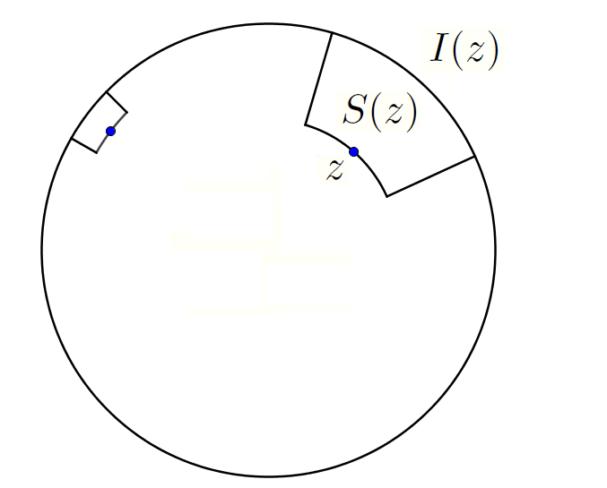 Il s'agit d'une classe de sous ensembles du plan complexe qui permet de définir les mesures de Carleson